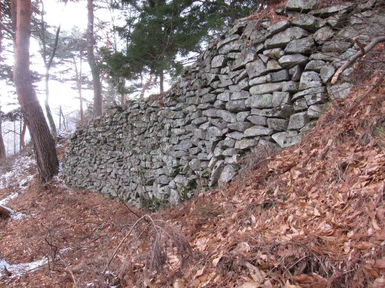 山家城